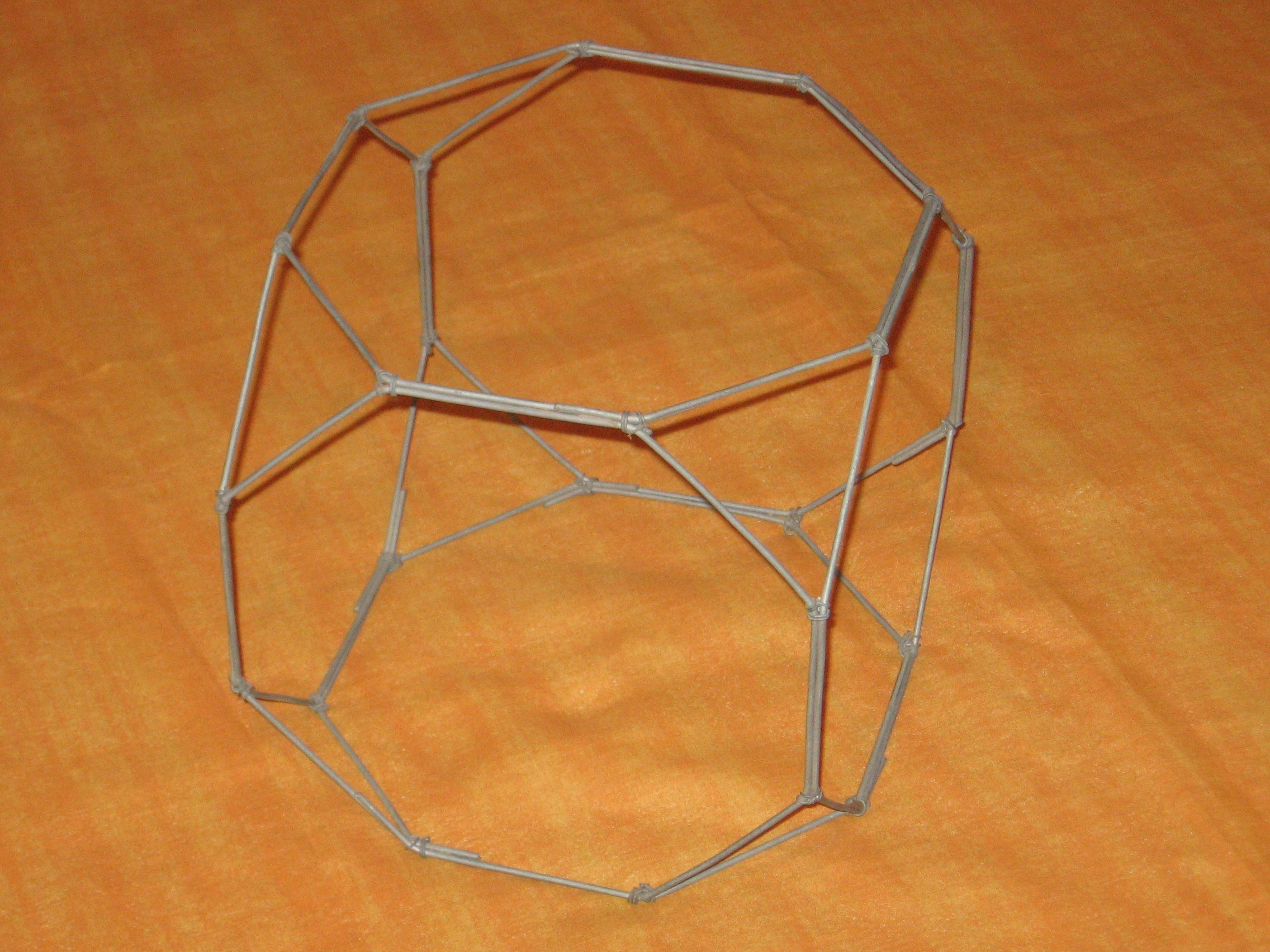 Model de filferros d'un cub truncat